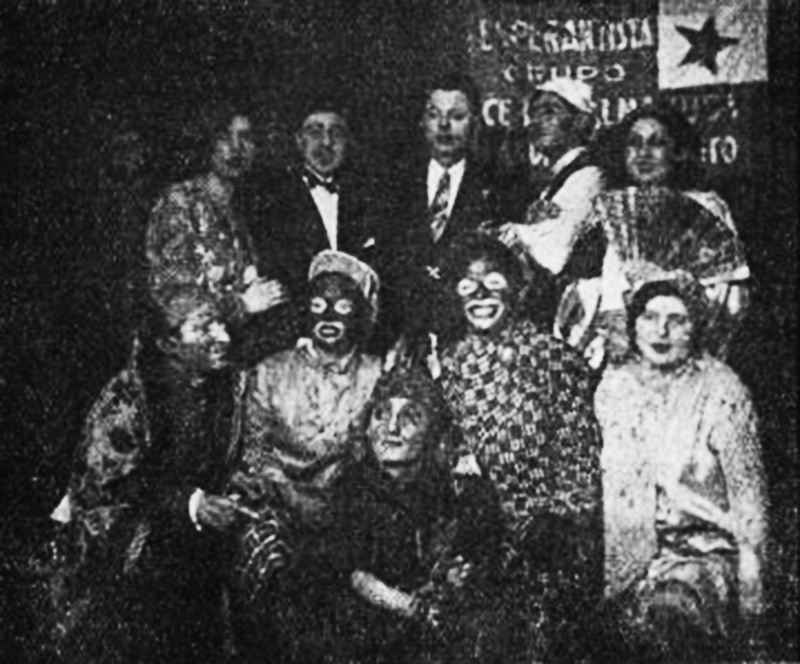 Sceno el la opereto Ho, tiuj fremduloj! de Feliks Hiller. La sceno prezentas la internacian Esperanto-valson. La prezentadon plenumis la teatra studrondo sub la arta gvidado de s-ro R. Koĉerginski kaj sub la Esperanta gvidado de s-ano S. Ŝik, Wilno, dum la Zamenhofa Vespero de Vilna Juda Landkonema Societo (turista organizaĵo). En la valso dancis en naciaj kostumoj dek diversaj popoloj.